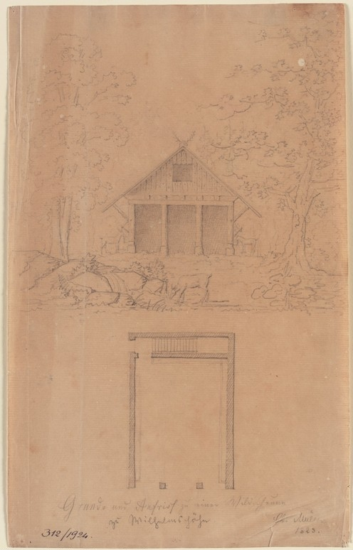 Kassel-Wilhelmshöhe, Entwurf für eine Wildscheune, perspektivische Ansicht und Grundriß